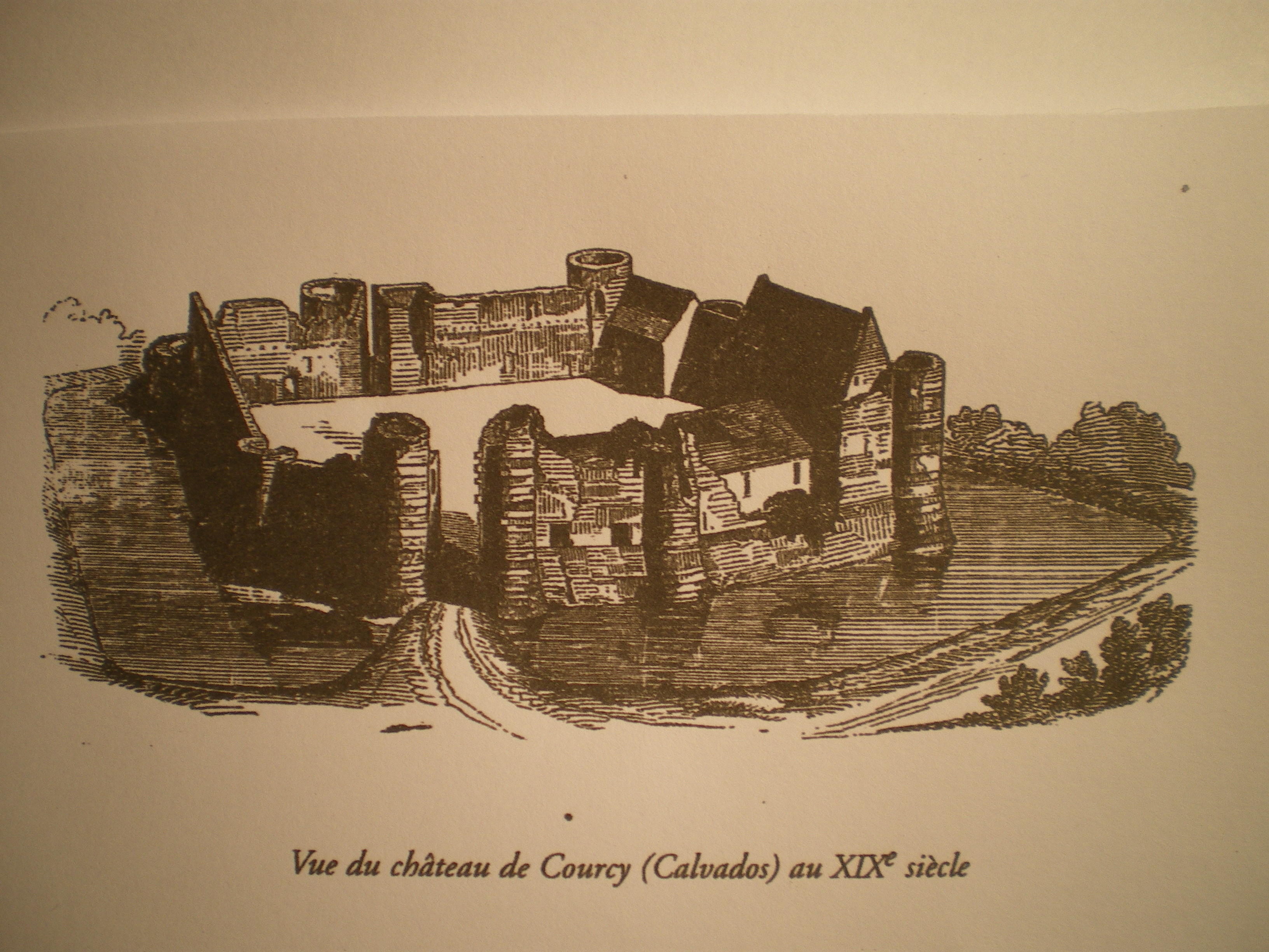 ruines du château de Courcy (Calvados)